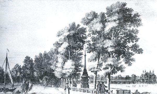 Tulpenburg aan de Amstel. Prent Mijlpaal en Tulpenburg.